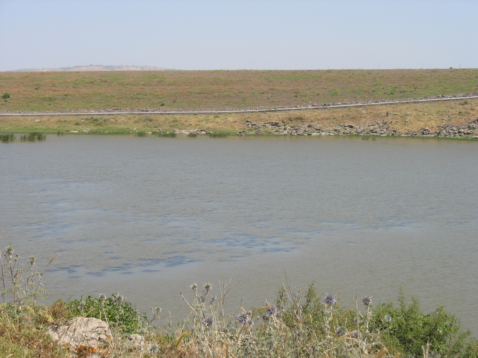 אגם ברמת דלתון בגליל העליון שהוא שקע בזלת